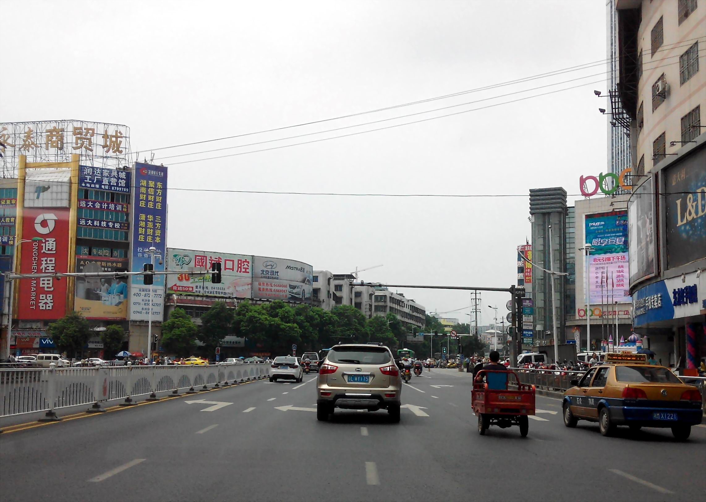 永州市 冷水滩区 市区